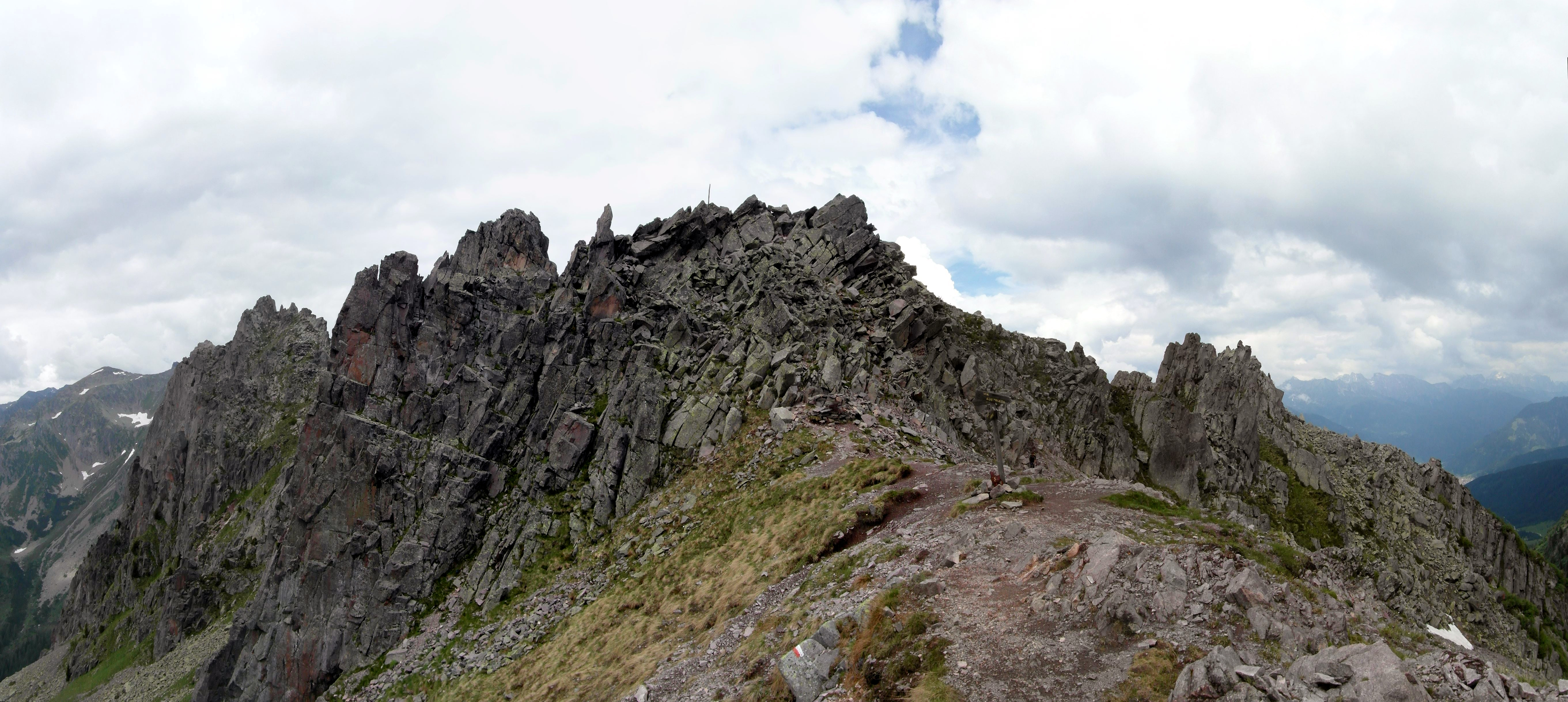 Monte Cauriol